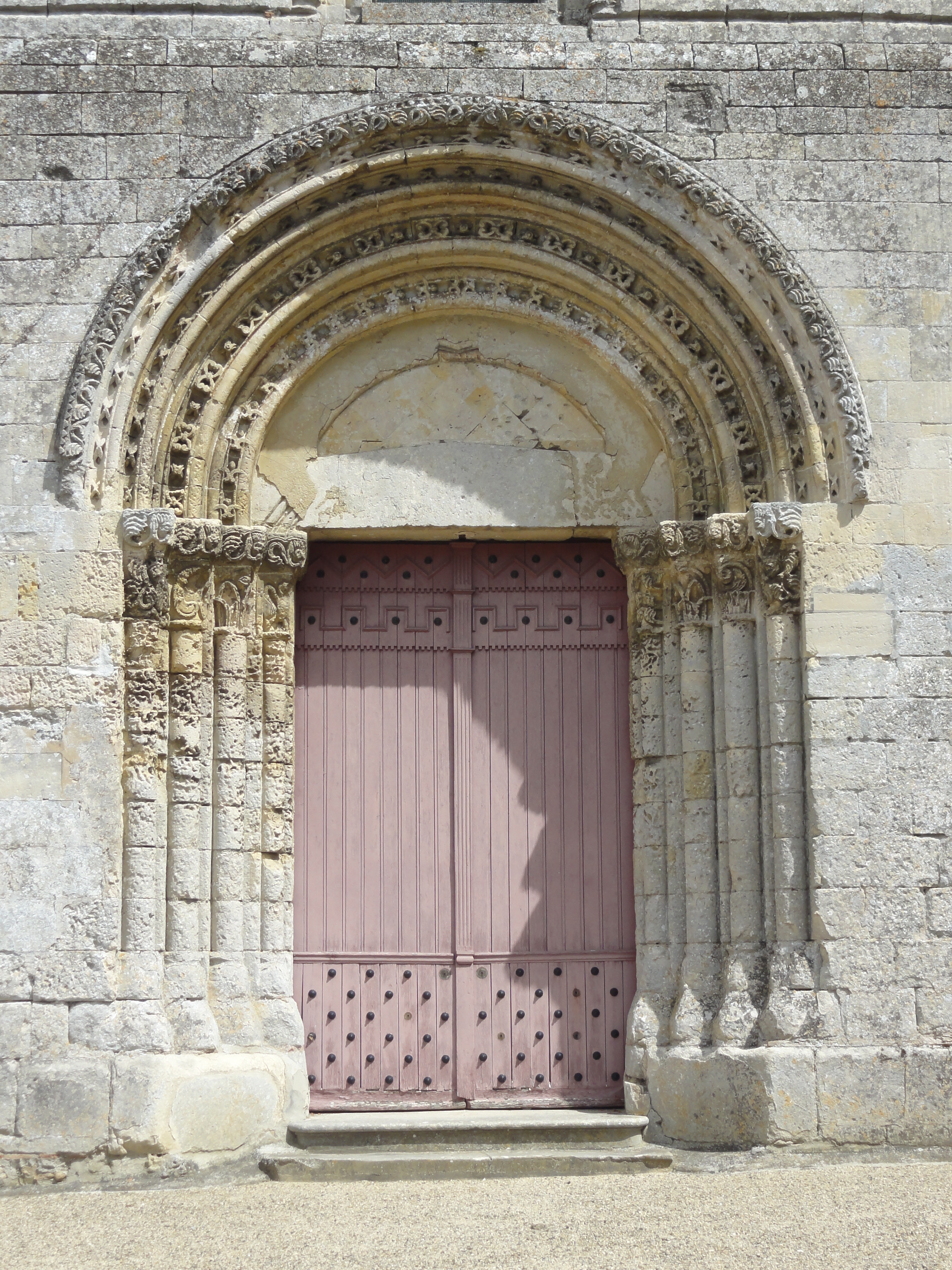 Église Saint-Vast de Nointel (voir titre).